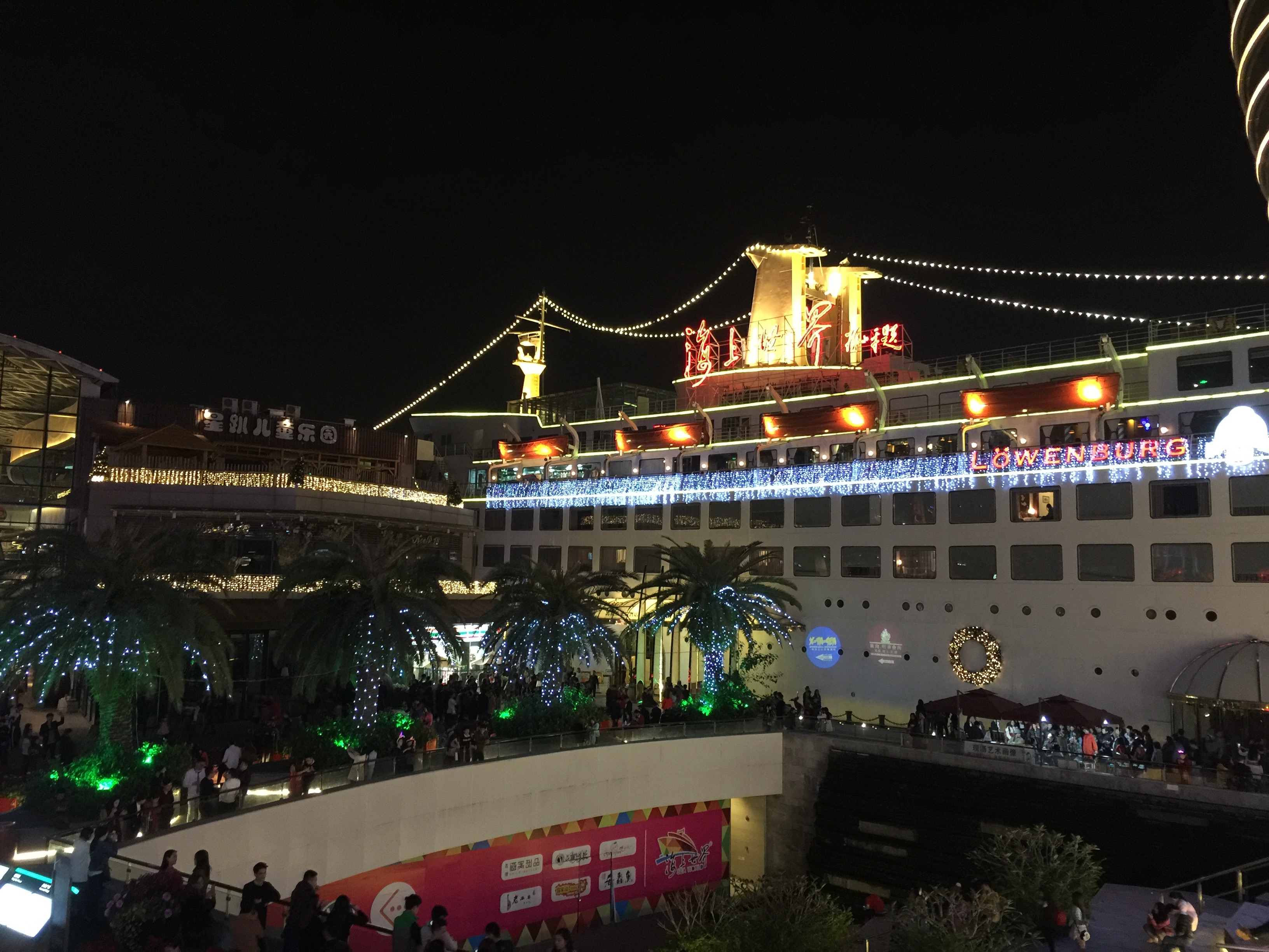 中文（中国大陆）: 深圳海上世界夜景